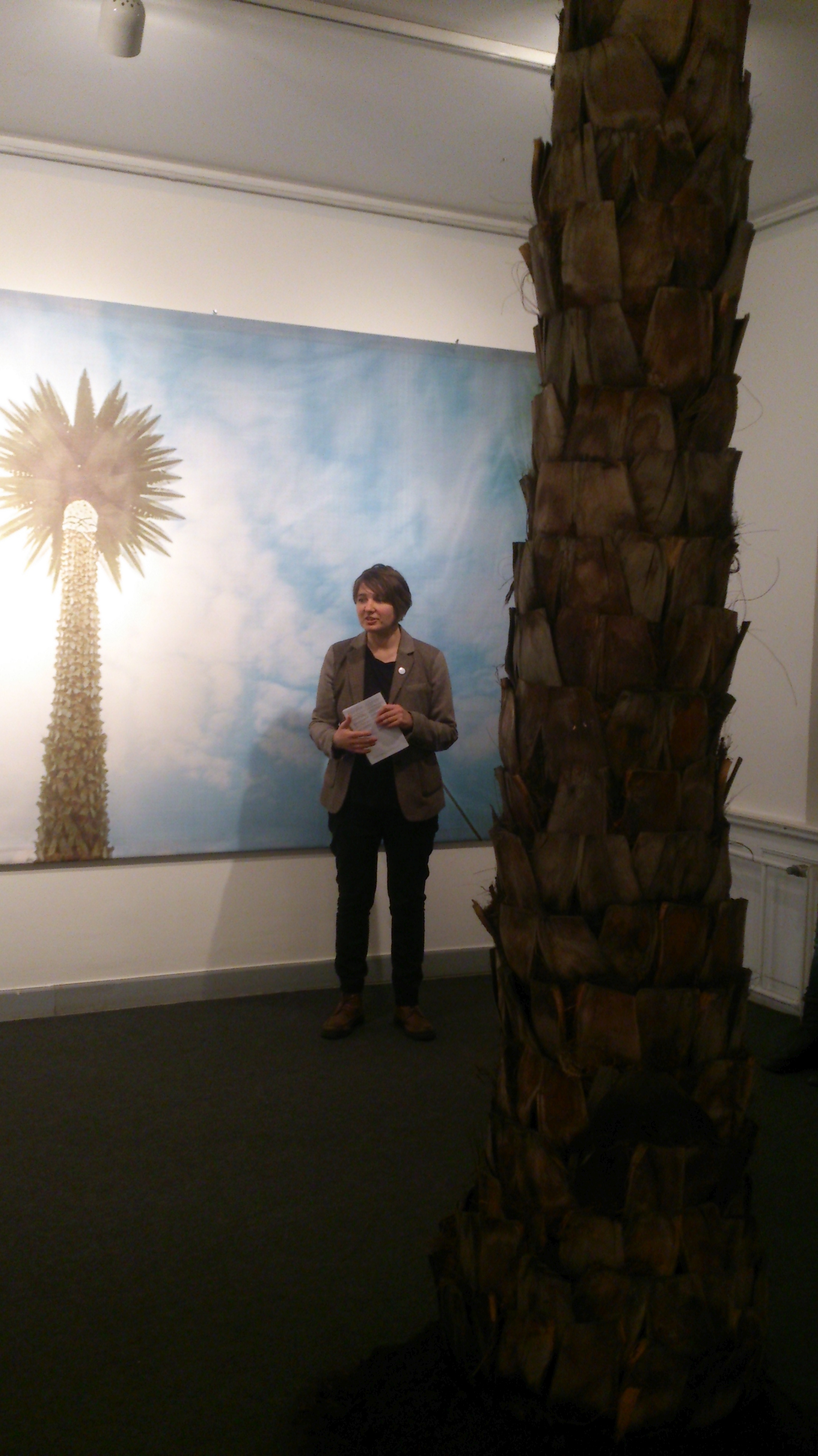 Rael Artel kuraatorituuril Tartu Kunstimuuseumi näitusel "Minu Poola", esinemas Poola kunstniku Joanna Rajkowska installatsiooni "Tervitused Jeruusalemma avenüült" materjalide ees. (Tegemist on mitte tervikinstallatsiooniga, mis asub Varssavis, vaid seda dokumenteerivate materjalidega.) (The piece of art is used de minimis - the main motif is the curator.)